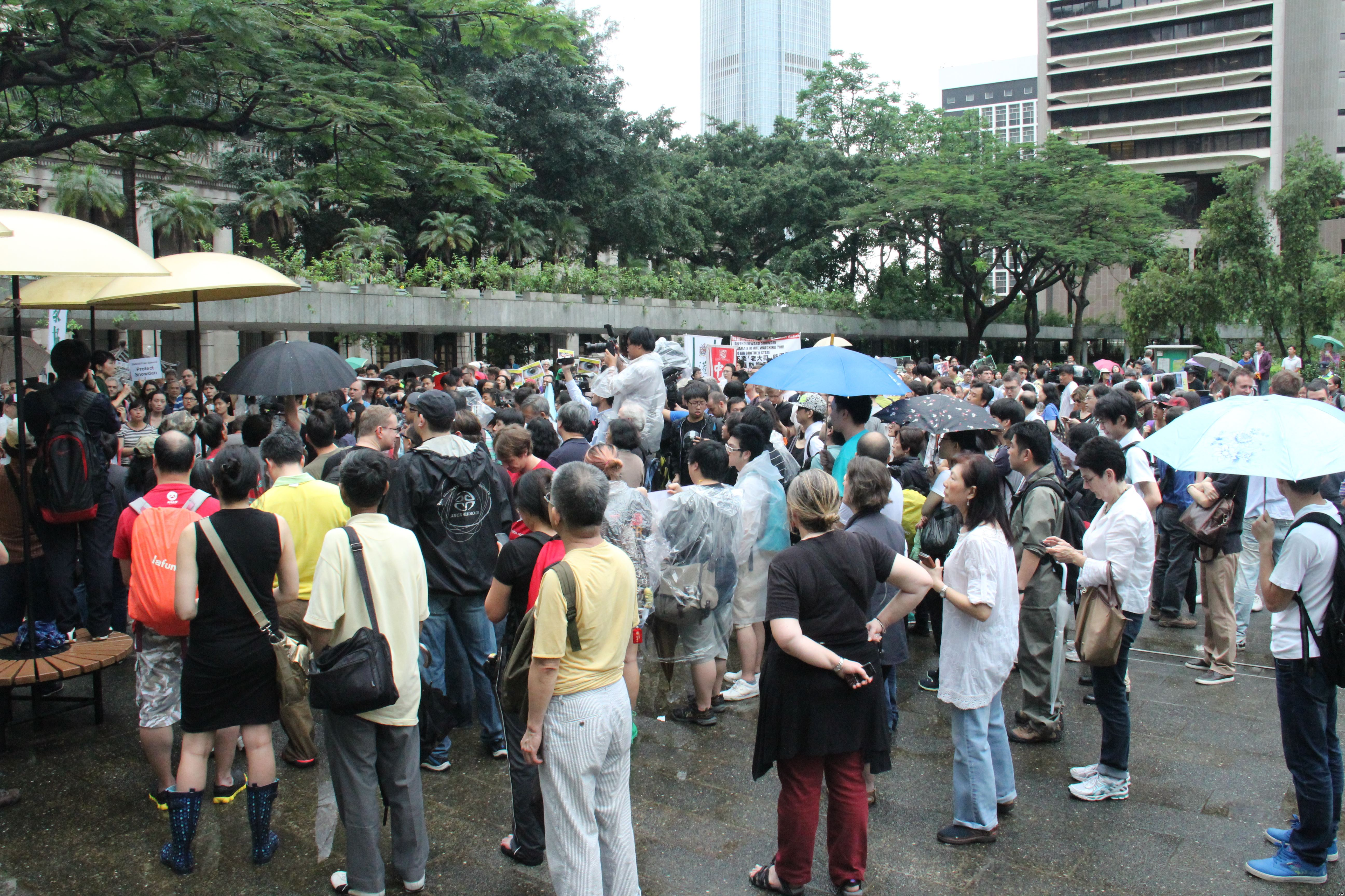 香港数百人在遮打花园和美国驻香港总领事馆前声援斯诺登（美国之音海彦拍摄）